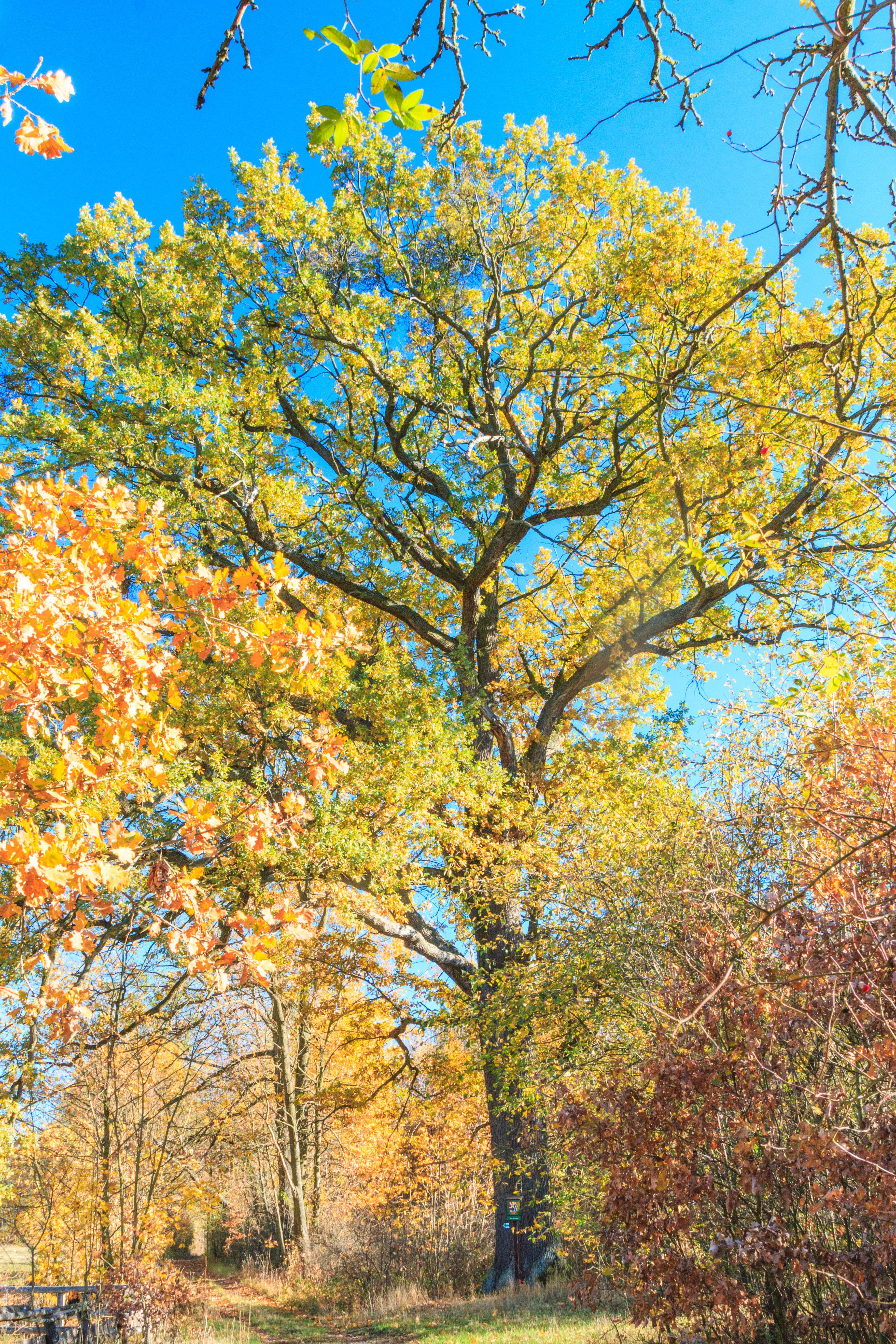 Památný dub Židák u Rožďalovic Project: Vodstvo.